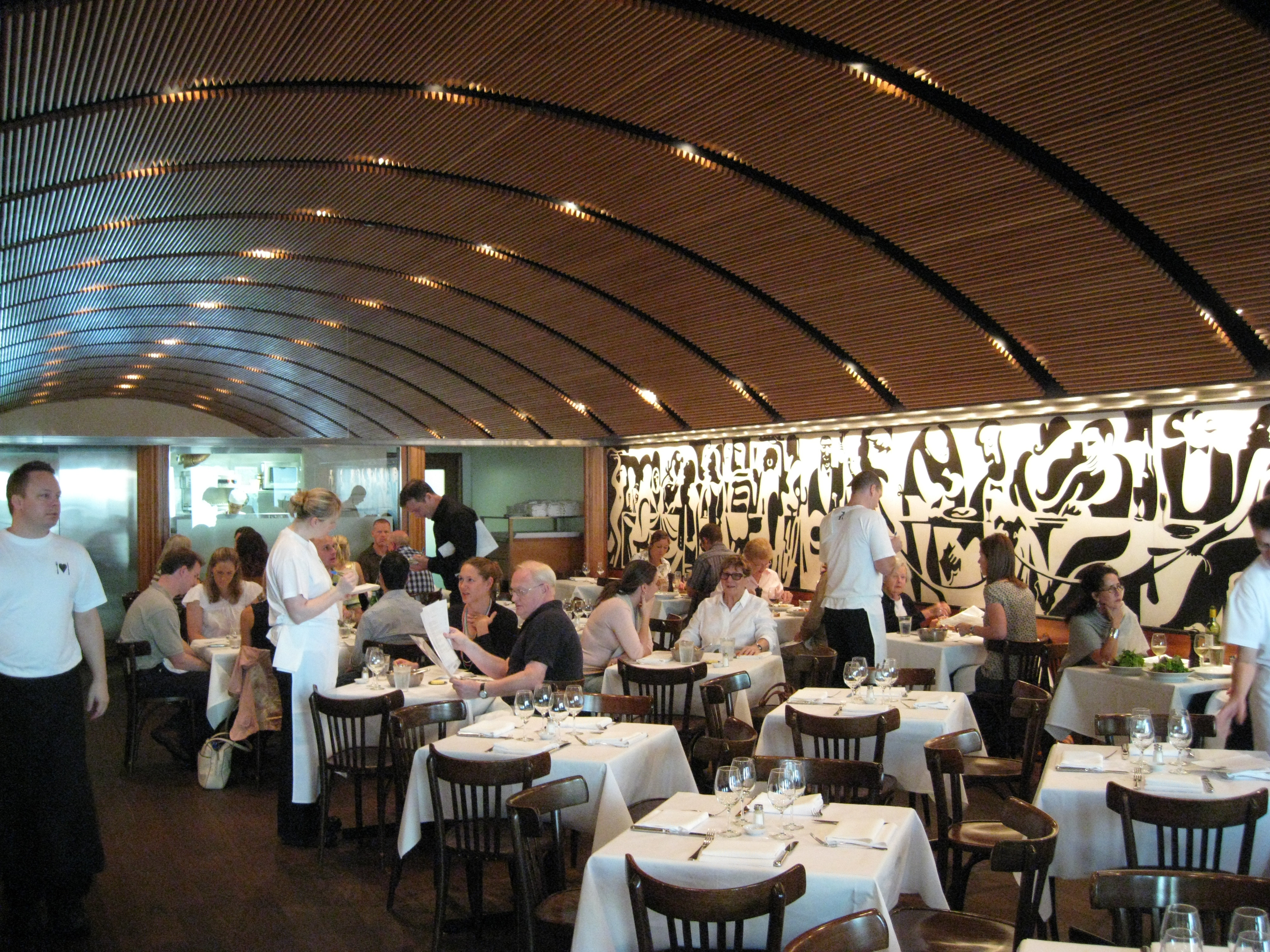 Bistro Moncur